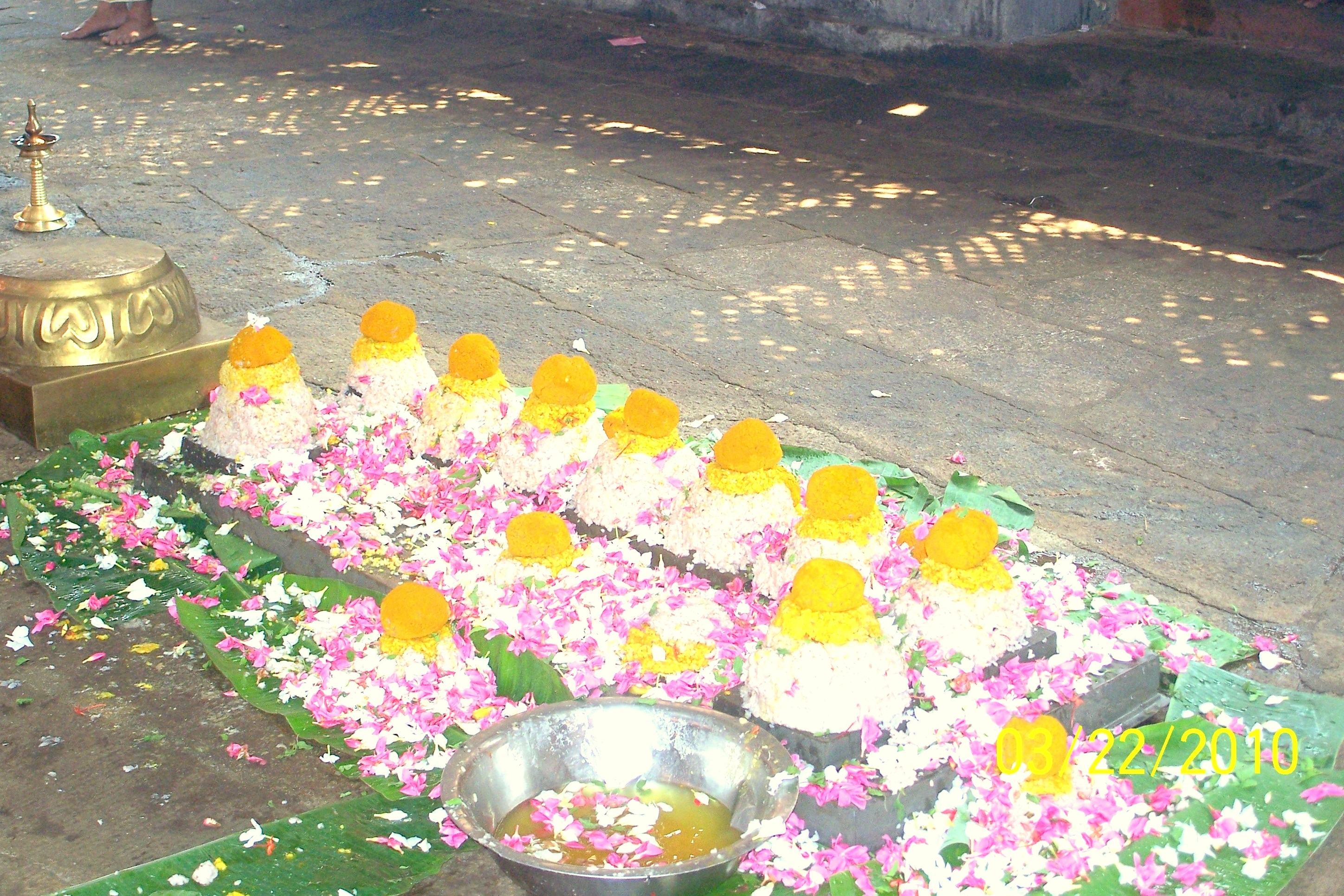 സപ്തമാതൃക്കൾ;വാഴപ്പള്ളിയിലെ എട്ടാം ഉത്സവനാളിലെ ഉത്സവബലി